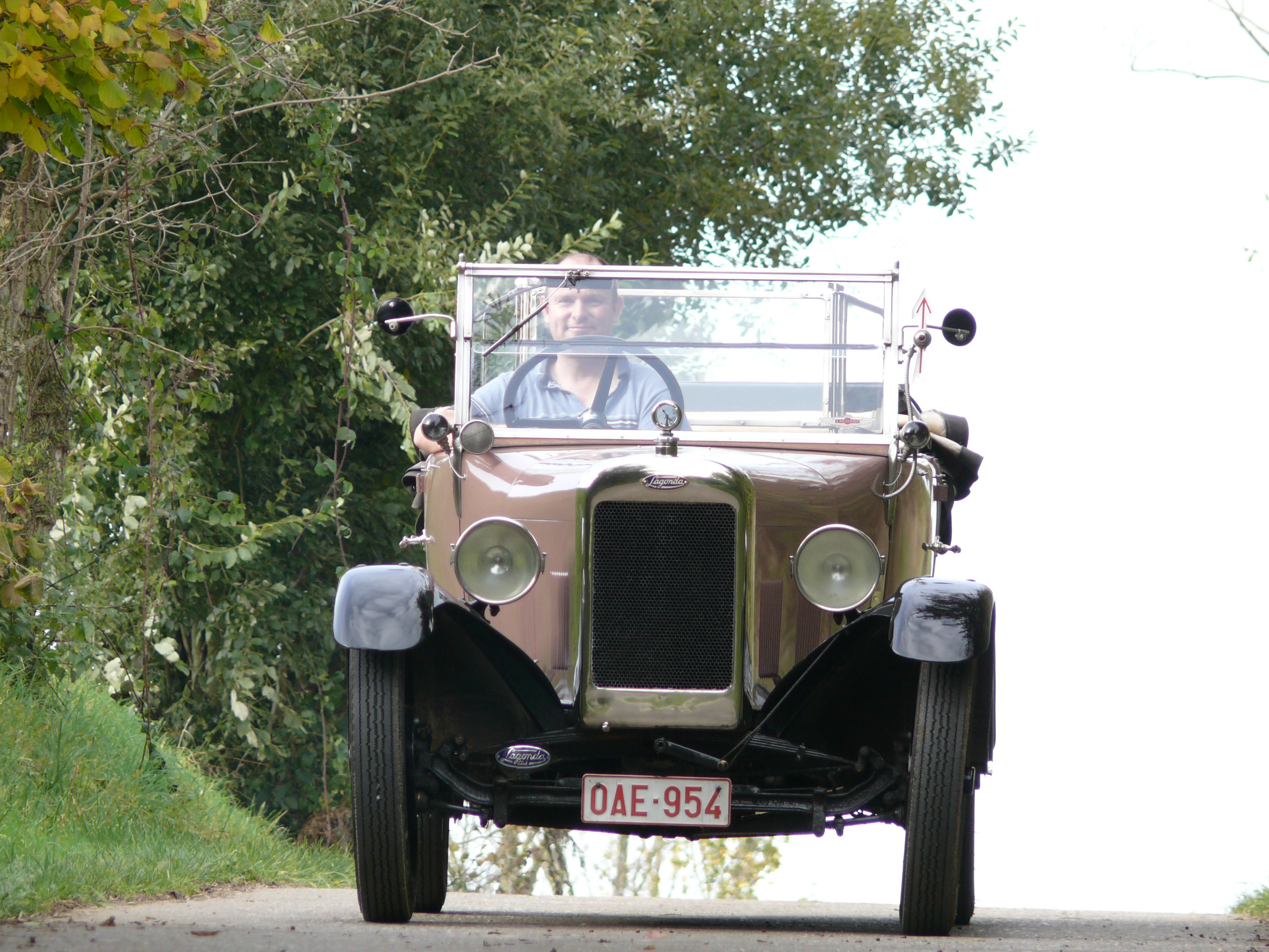 Lagonda 12/24LC tourer 1925 LC indicates this car is a tourer and has a monocoque construction. The saloon 12/24 S has a separate chassis as some of the later models. All 12/24 cars were build with a factory body.